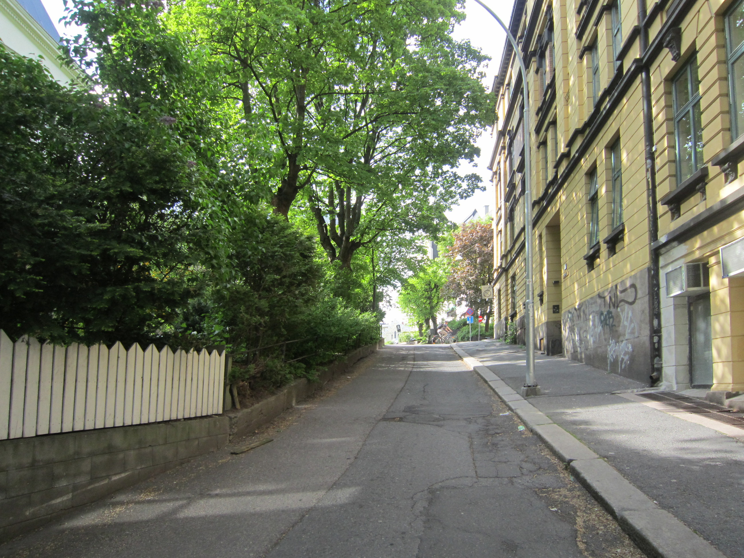 Homansbakken i Oslo